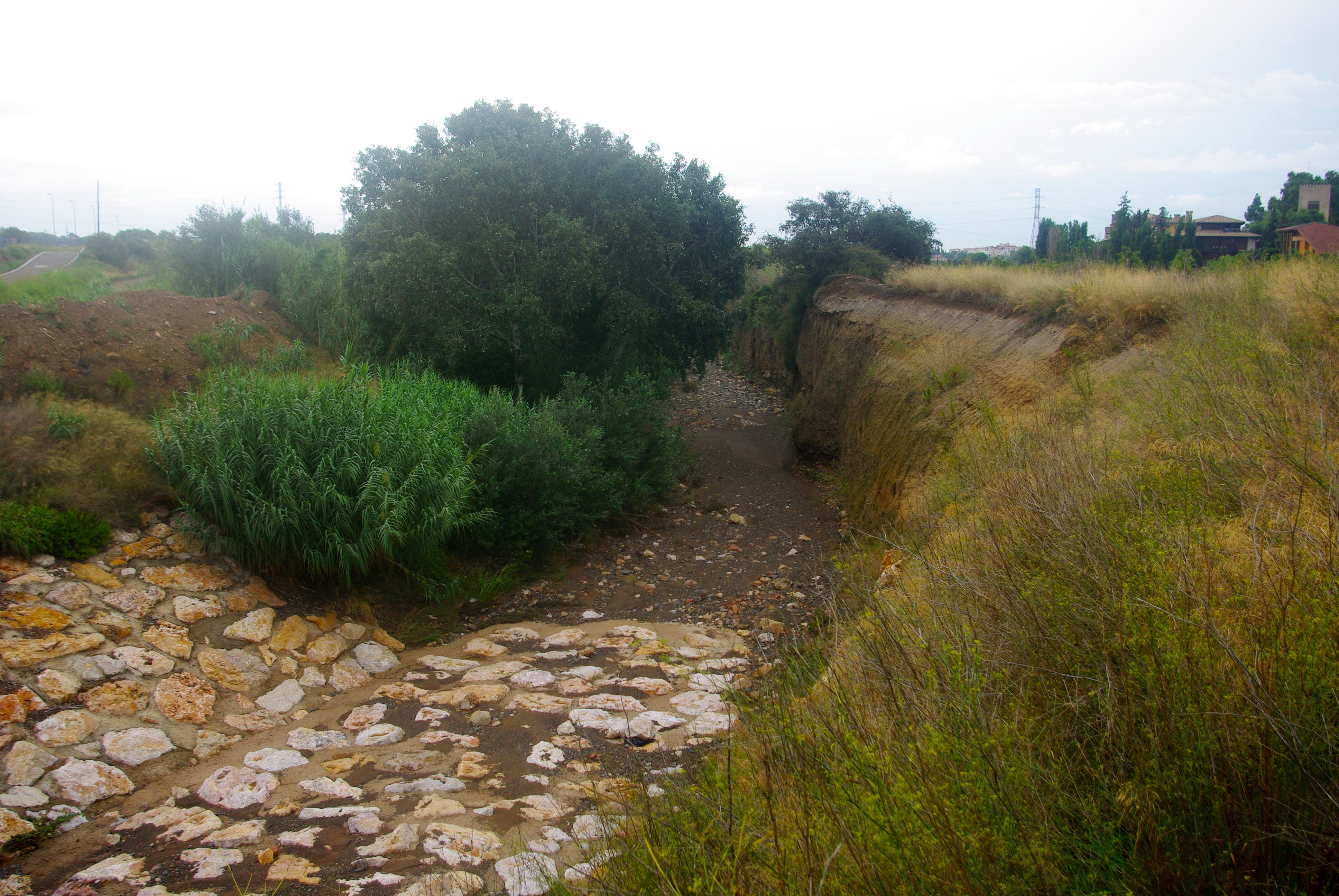 Riera de la Selva o de la Boella, vora La Boella, al terme de Reus